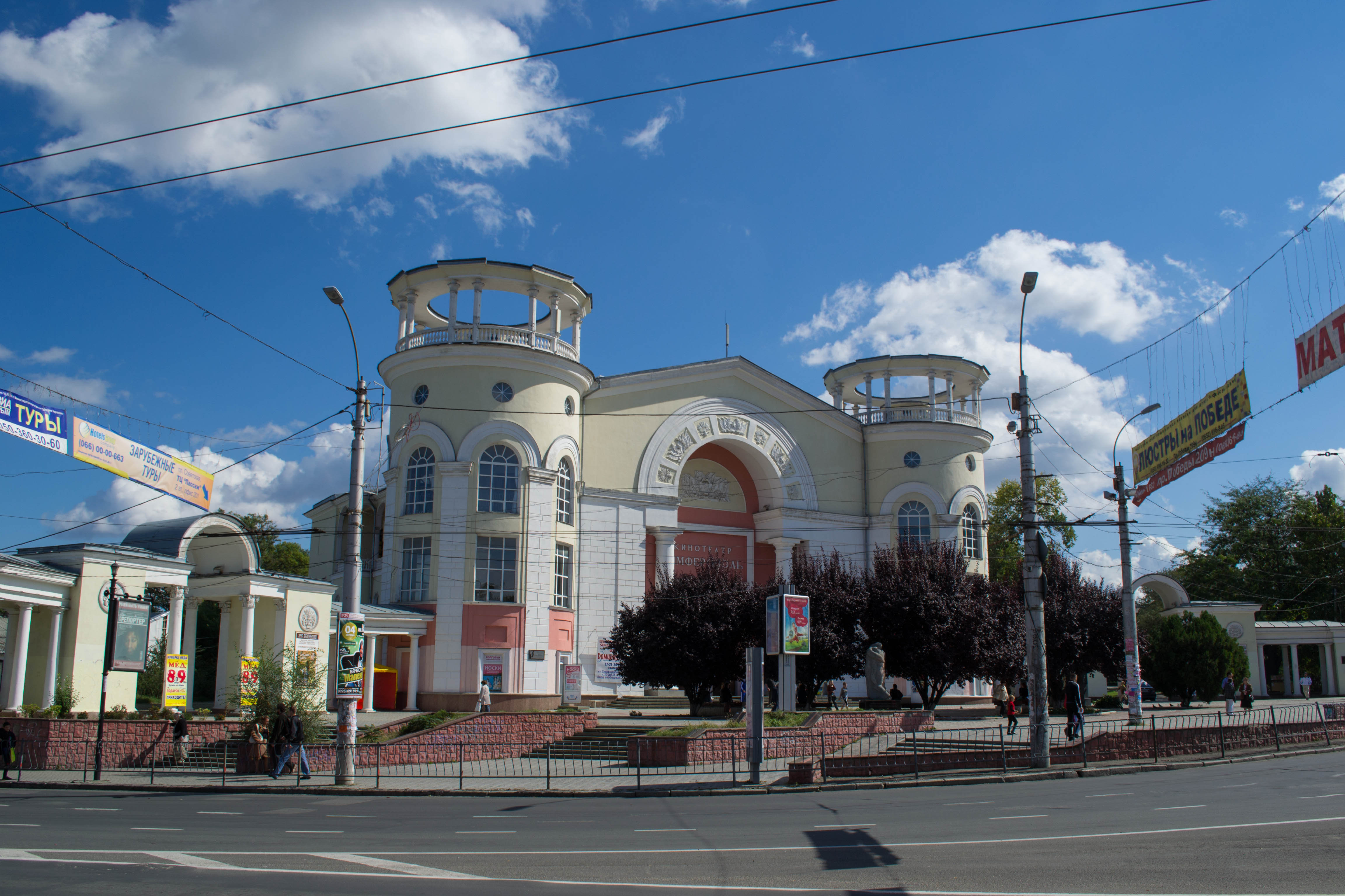 Будівля кінотеатру «Сімферополь», Сімферополь, пр. Кірова, 37, літер «А-3», «Б-1», «Б-2», «а-1», «а-2», «а-3», «а-4», «а-5», «а-6», «а-7», «а-8», «а-9», «а-10»